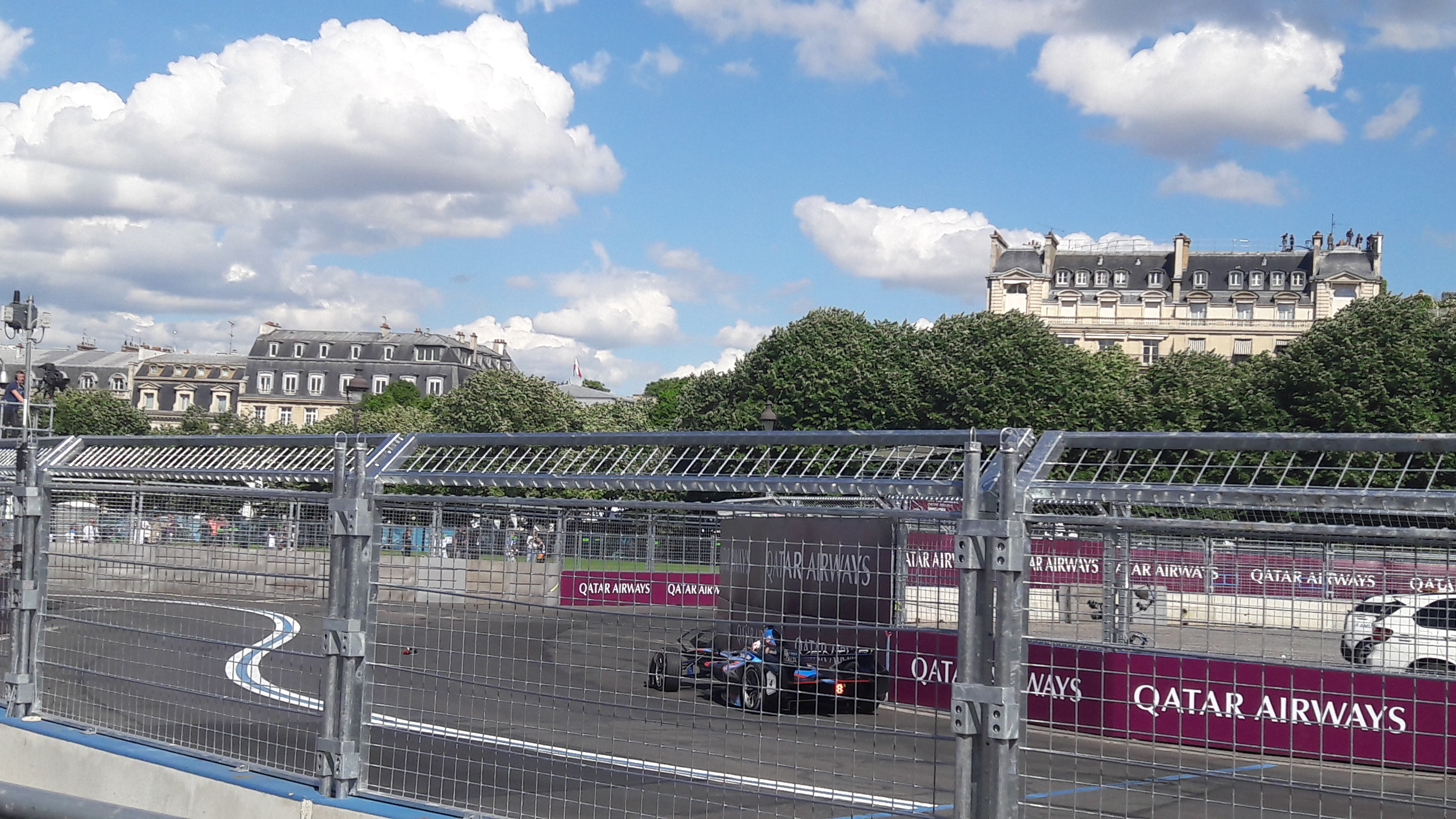 Course du FIA 2016–17 Formula E season, Paris eprix 2017